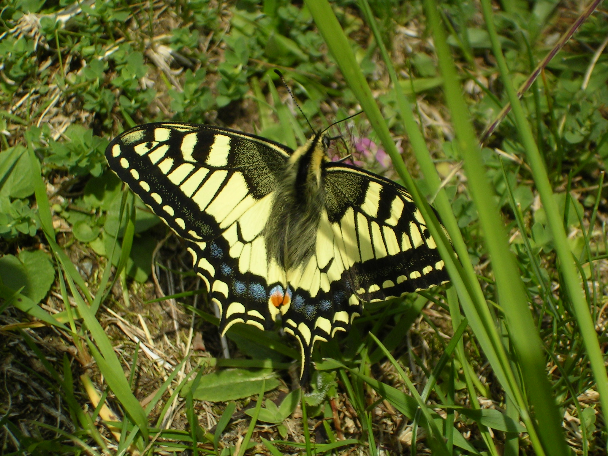 (en) Papilio machaon Place: Switzerland, BE (de) Schwalbenschwanz (Papilio machaon). Im Berner Oberland (CH) hatte ich mal das Glück, einen dieser sehr scheuen Schmetterlinge fotografieren zu können. Aufnahmeort: Schweiz, BE (Susten) Bearbeitung: GIMP Kontrast angepasst (Kurven) Zugeschnitten Helligkeitswert angepasst